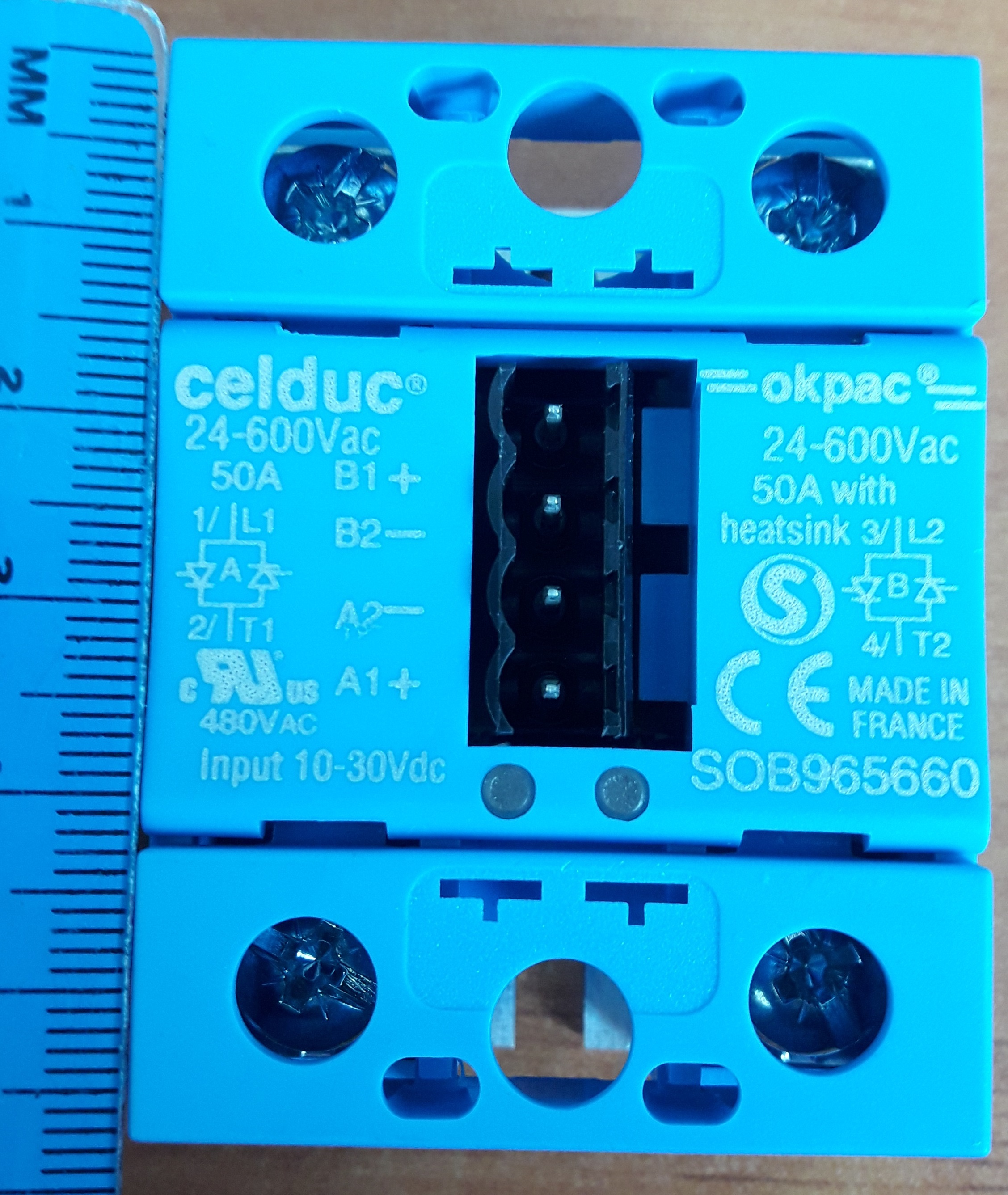 de marque celduc fabriqué en France